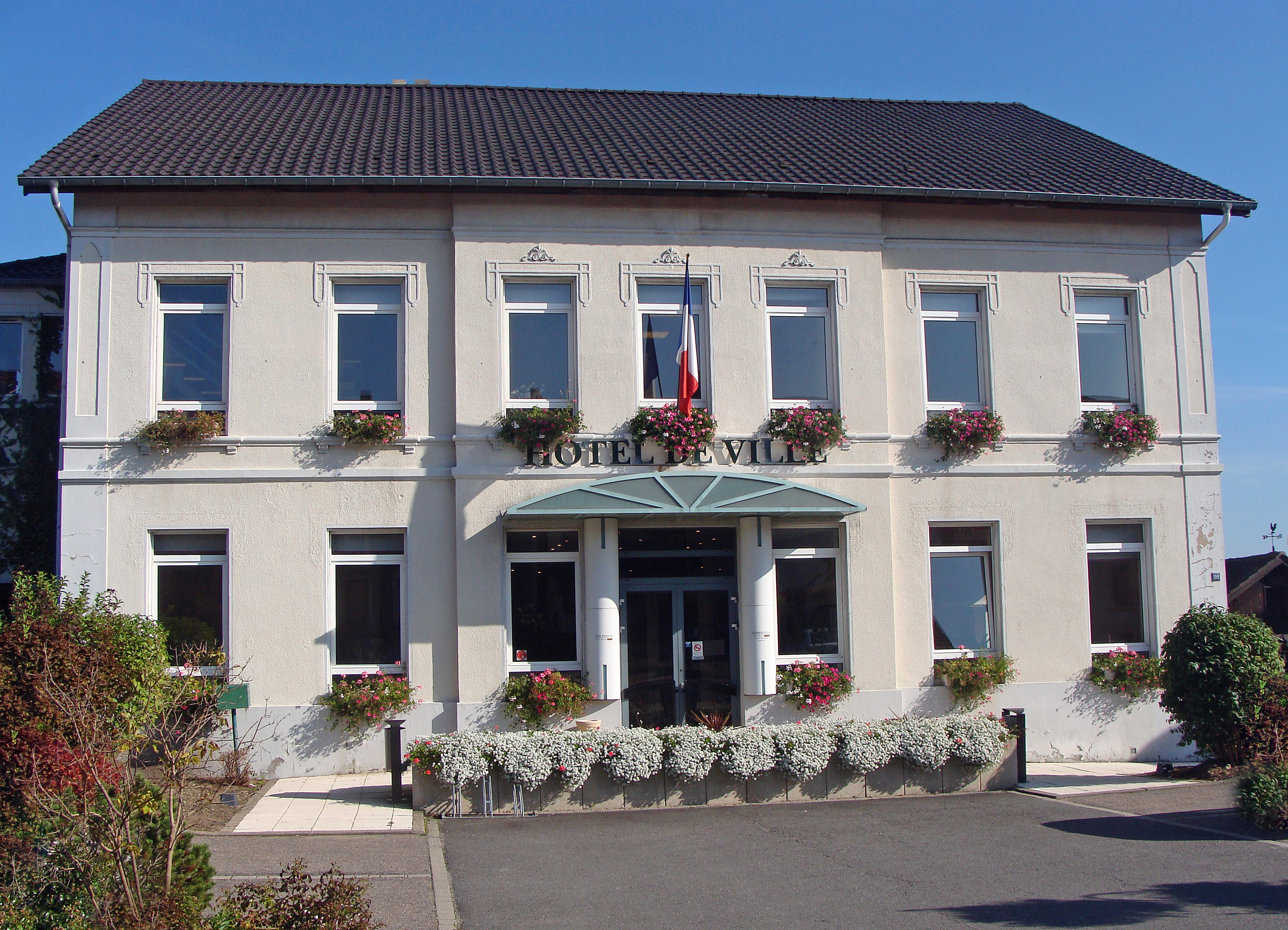 Ancienne direction du puits Saint-Max (bâtiment principal), actuel Hôtel de Ville de Carling.